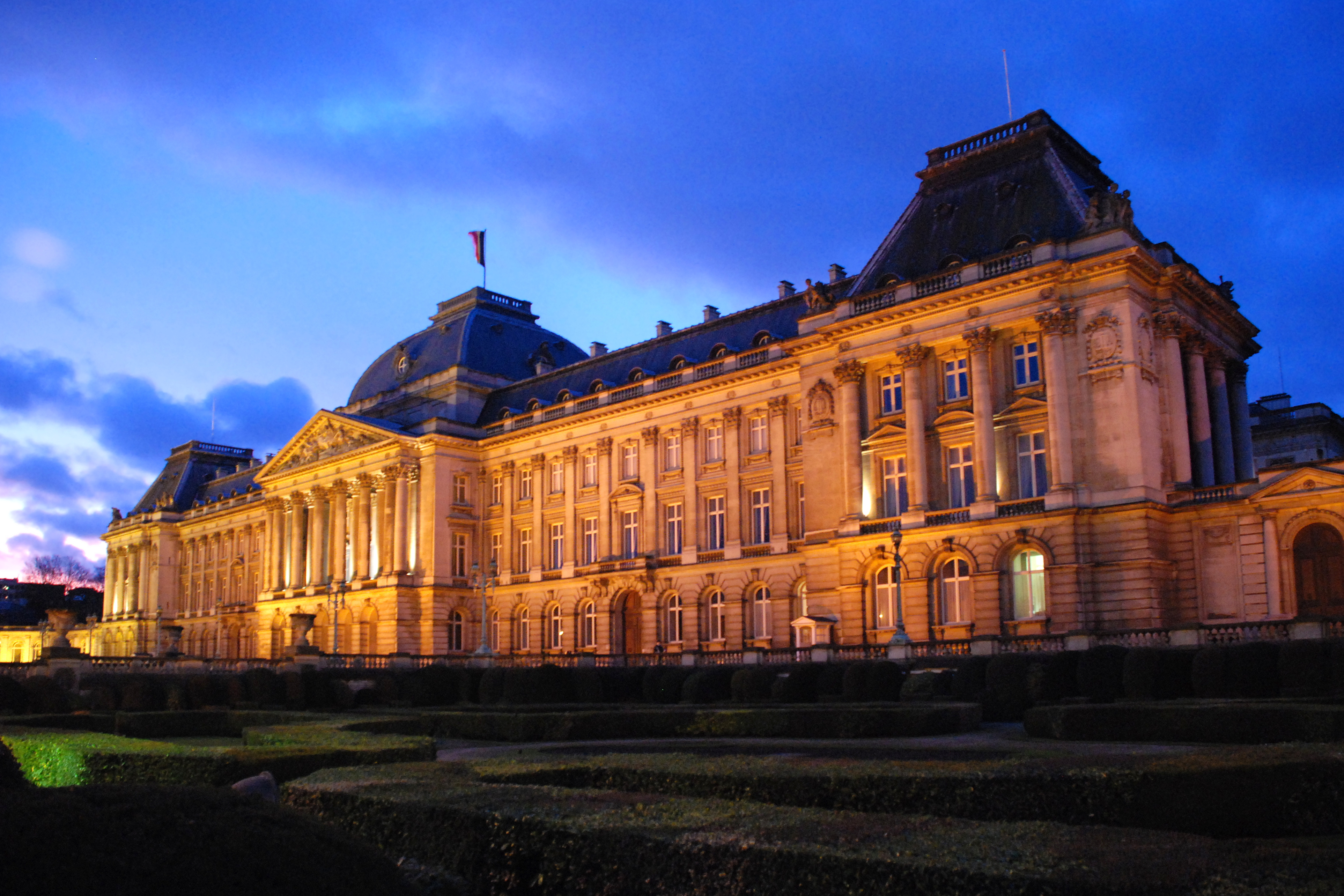 Belgique - Bruxelles - Palais royal